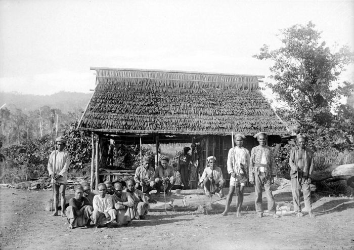 Negatief. Inwoners van het dorp Waepote voor een huis op het eiland Boeroe